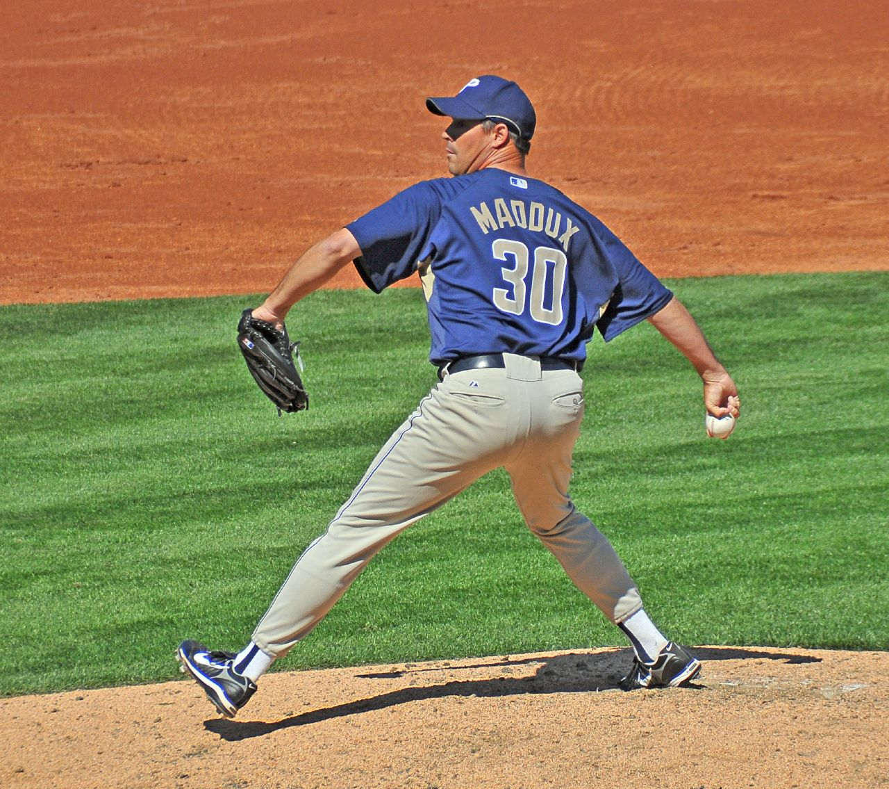 Greg Maddux